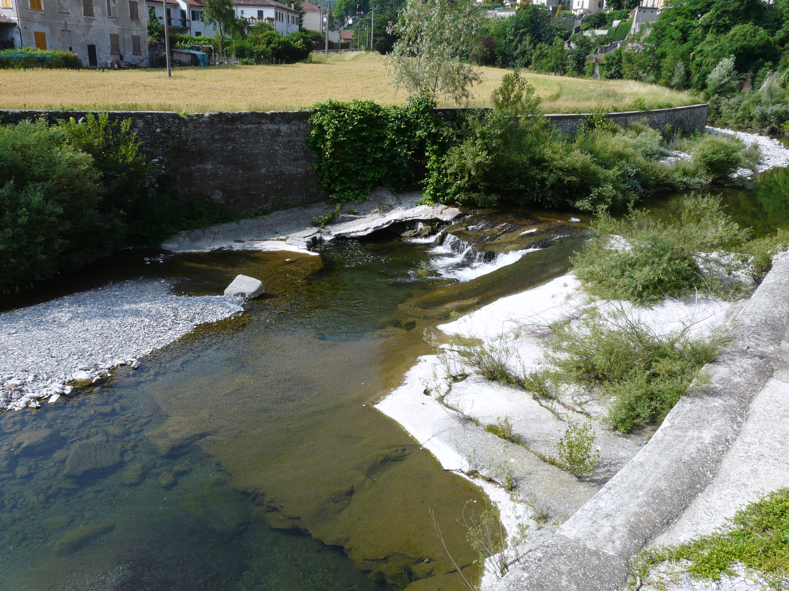 Torrente Lemme, Voltaggio, Piemonte, Italia